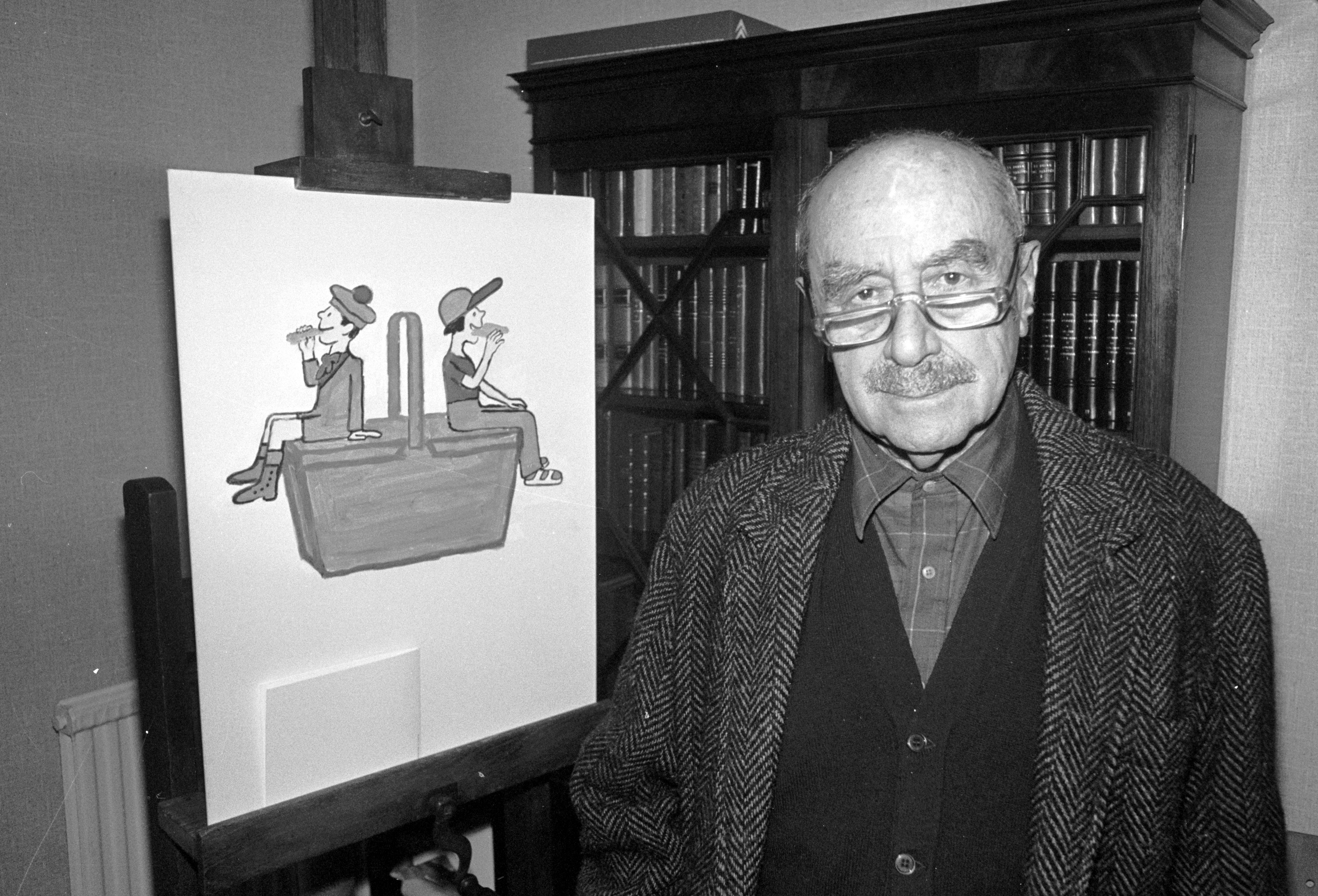 L'affichiste français Raymond Savignac chez lui à Trouville-sur-Mer (Calvados, France).